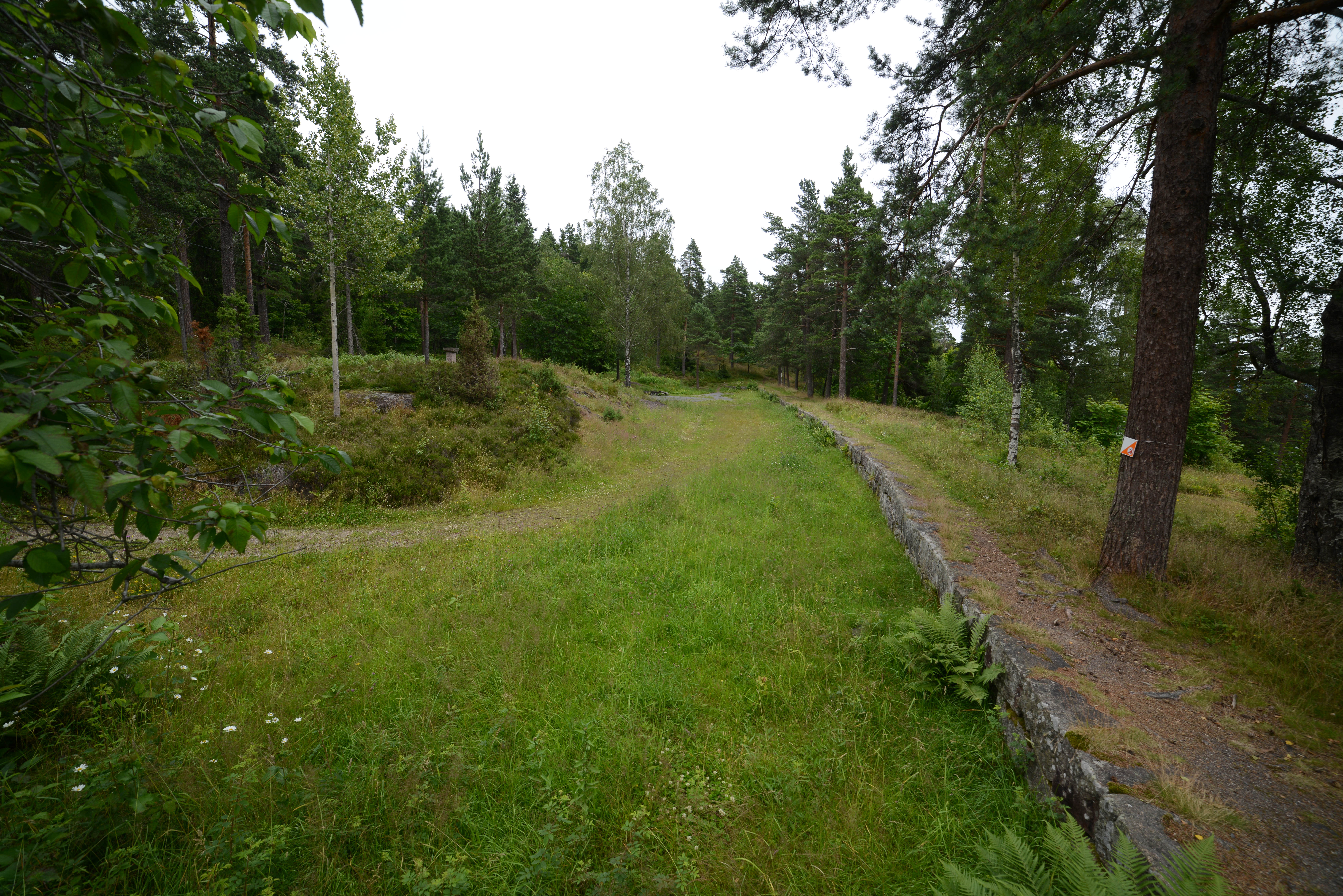 Bragernesåsen østre batteri